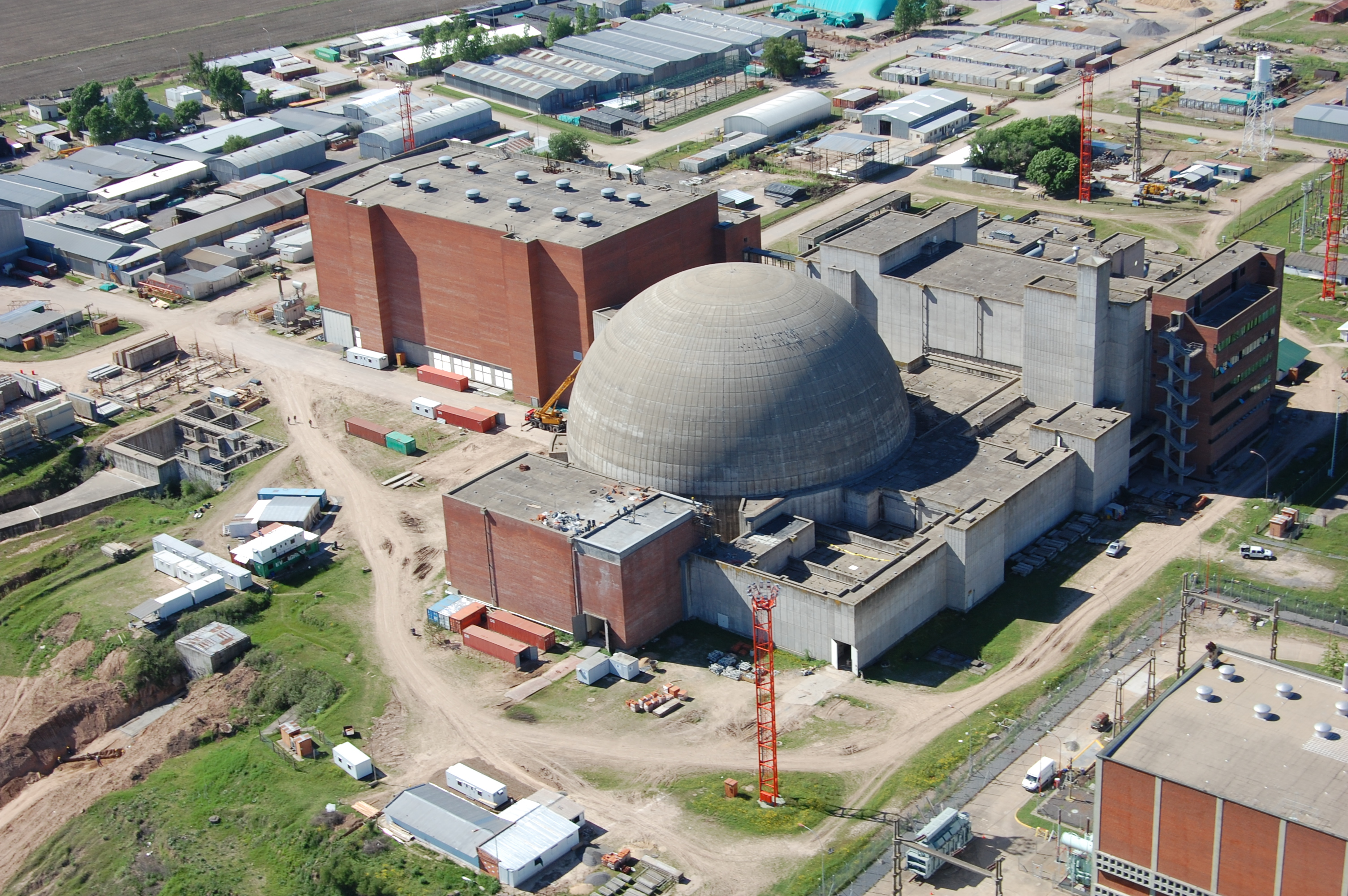 Atucha II